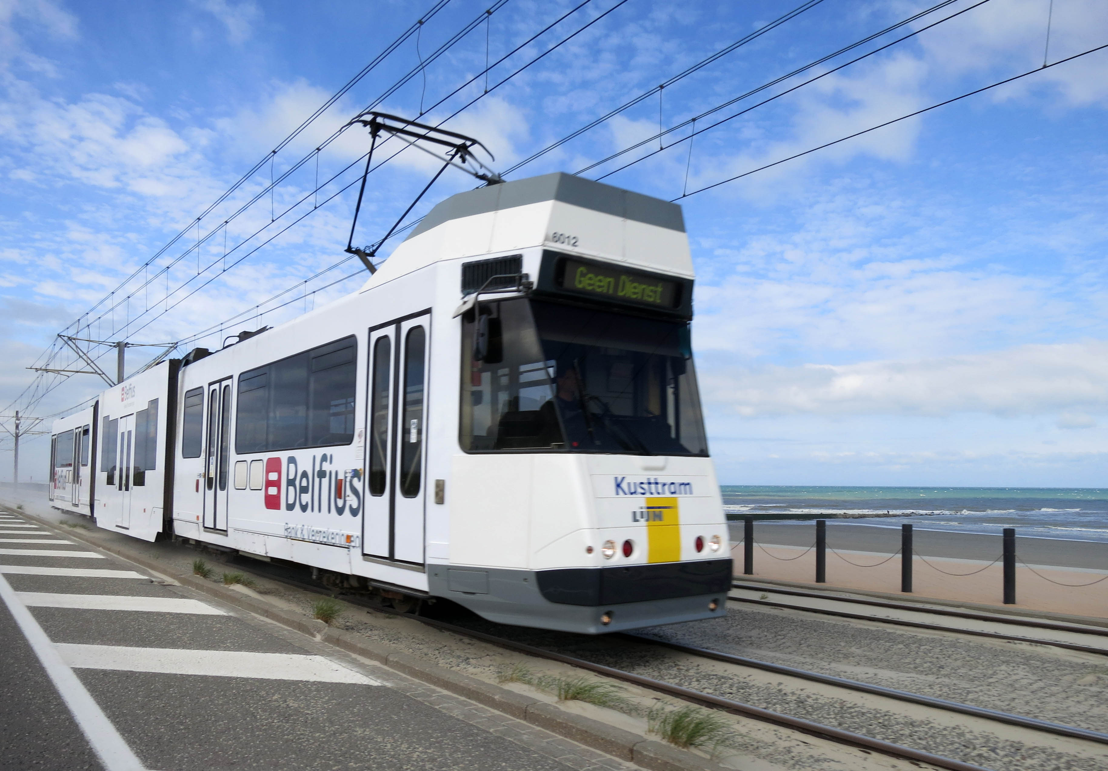 Kusttram